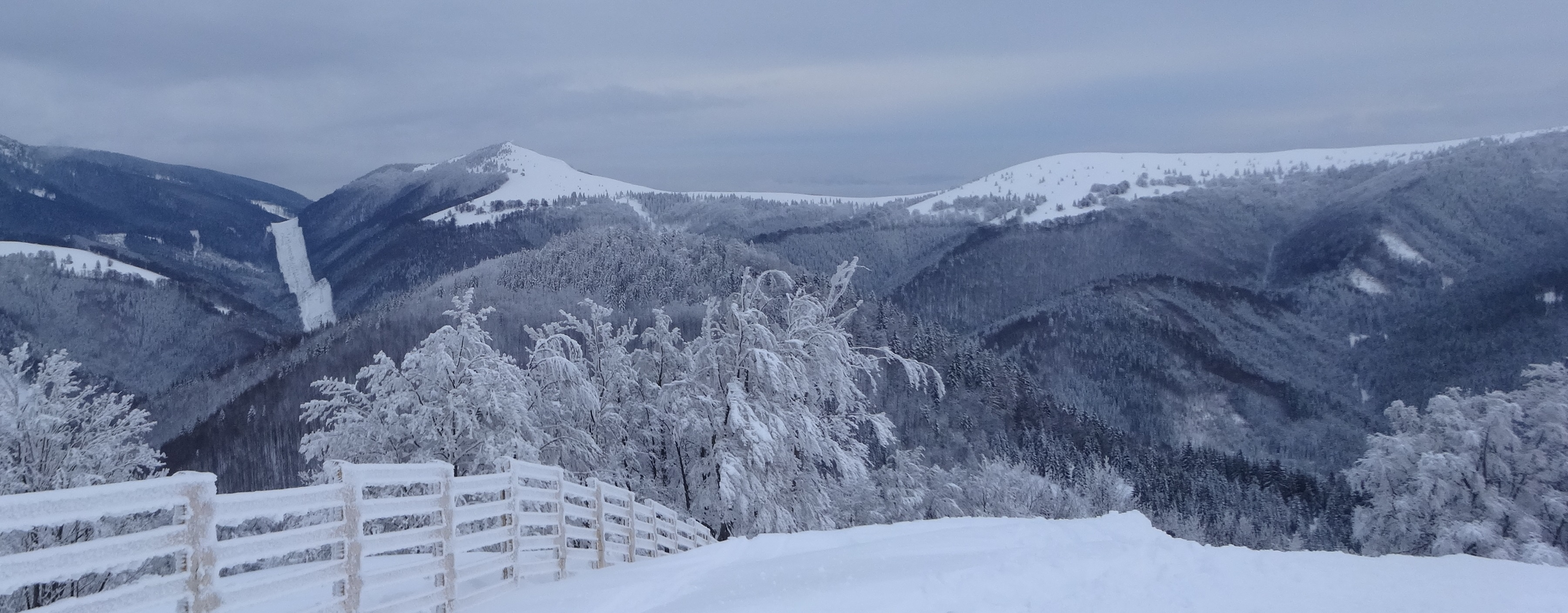 Pohľad z Novej hole